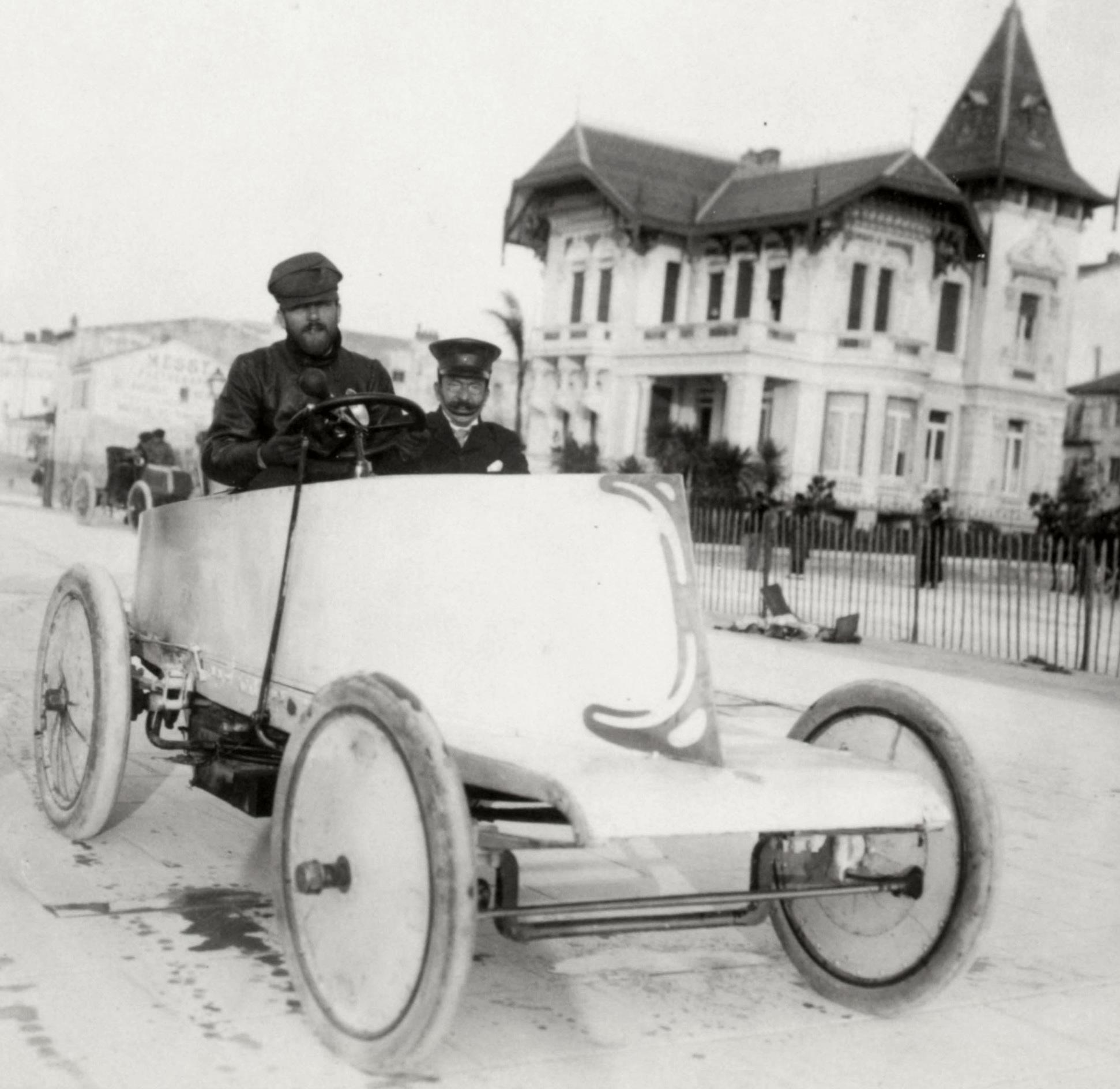 [Collection Jules Beau. Photographie sportive] : T. 20. Année 1903 / Jules Beau : F. 46v. [Quinzaine de Nice, Concours de Mille et Coupes Henri Rothschild, 7 avril 1903]